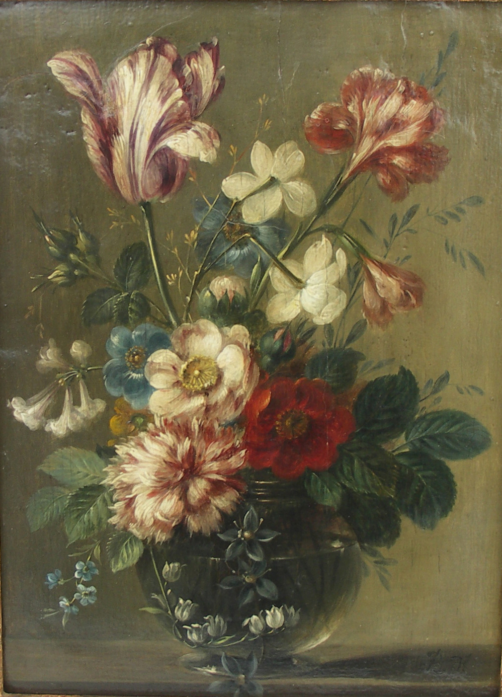 vase de fleurs par Belin de Fontenay